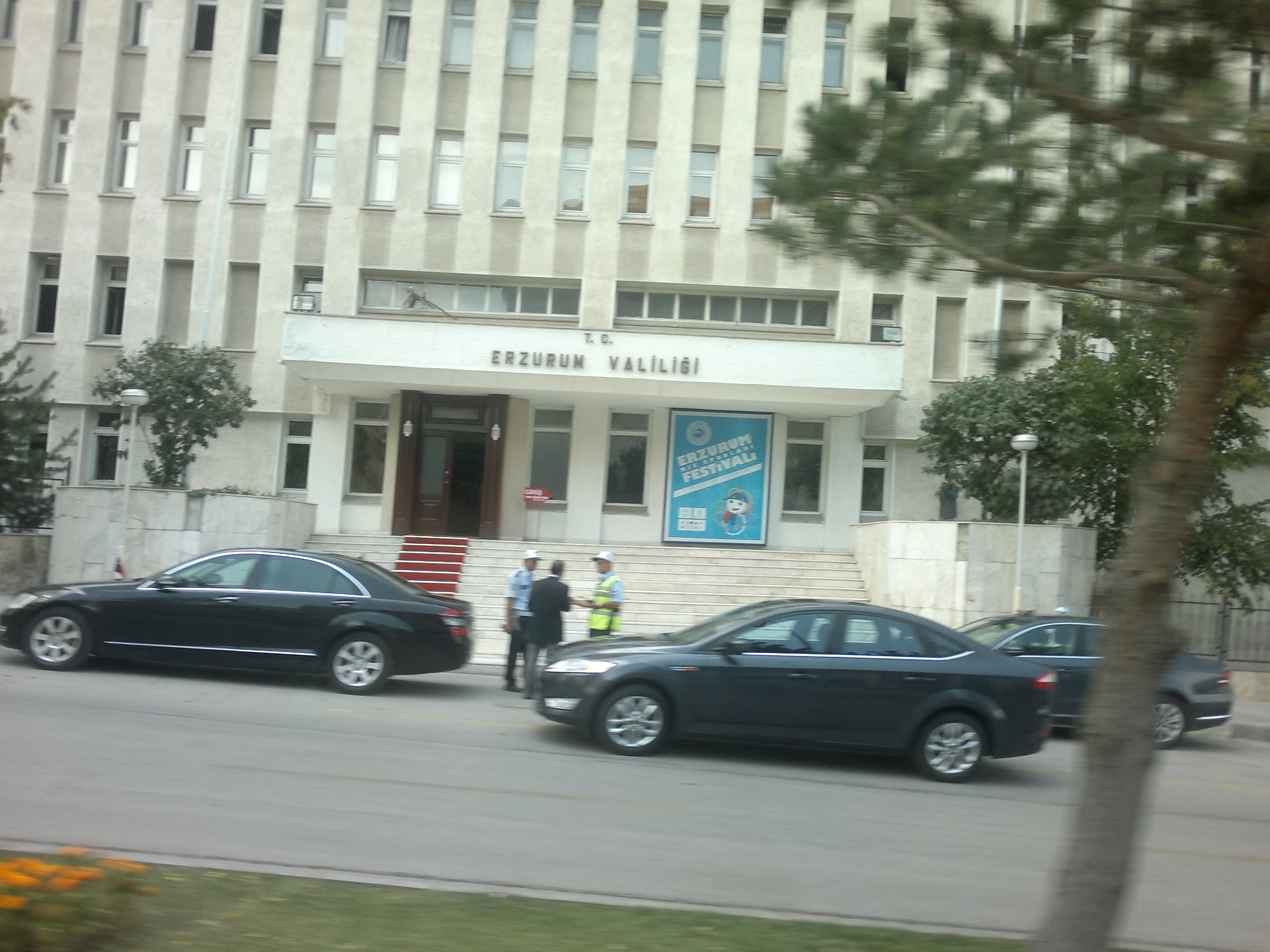 Erzurum Valiliği.